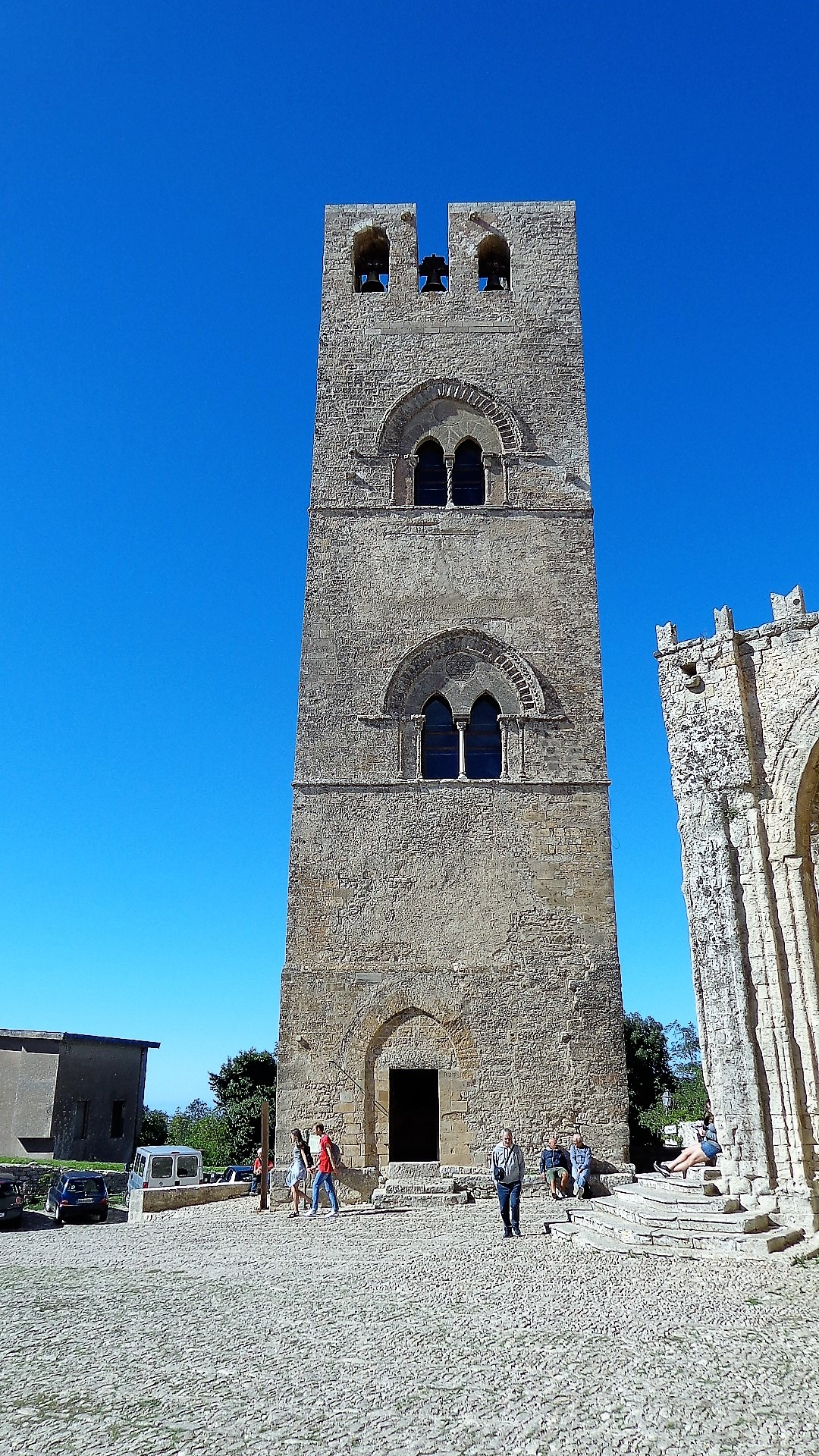 Chiesa Madre (Erice) - Bell tower